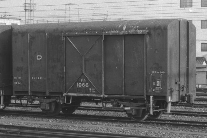 JNR Temu 1066（テム300形式、テム1066）